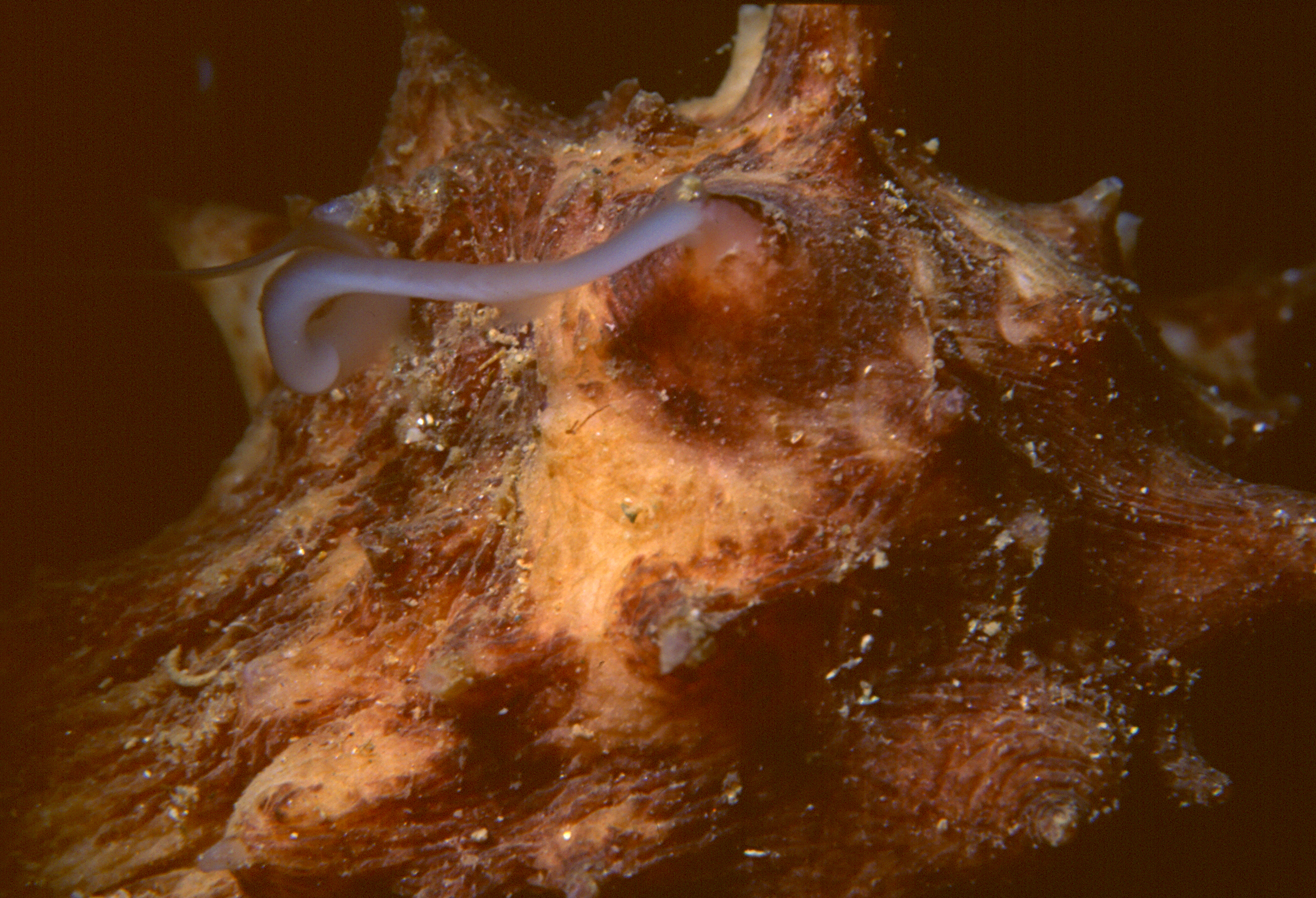 Holothuria tubulosa Gmelin, 1790 - Banyuls-sur-Mer : 07/99 '